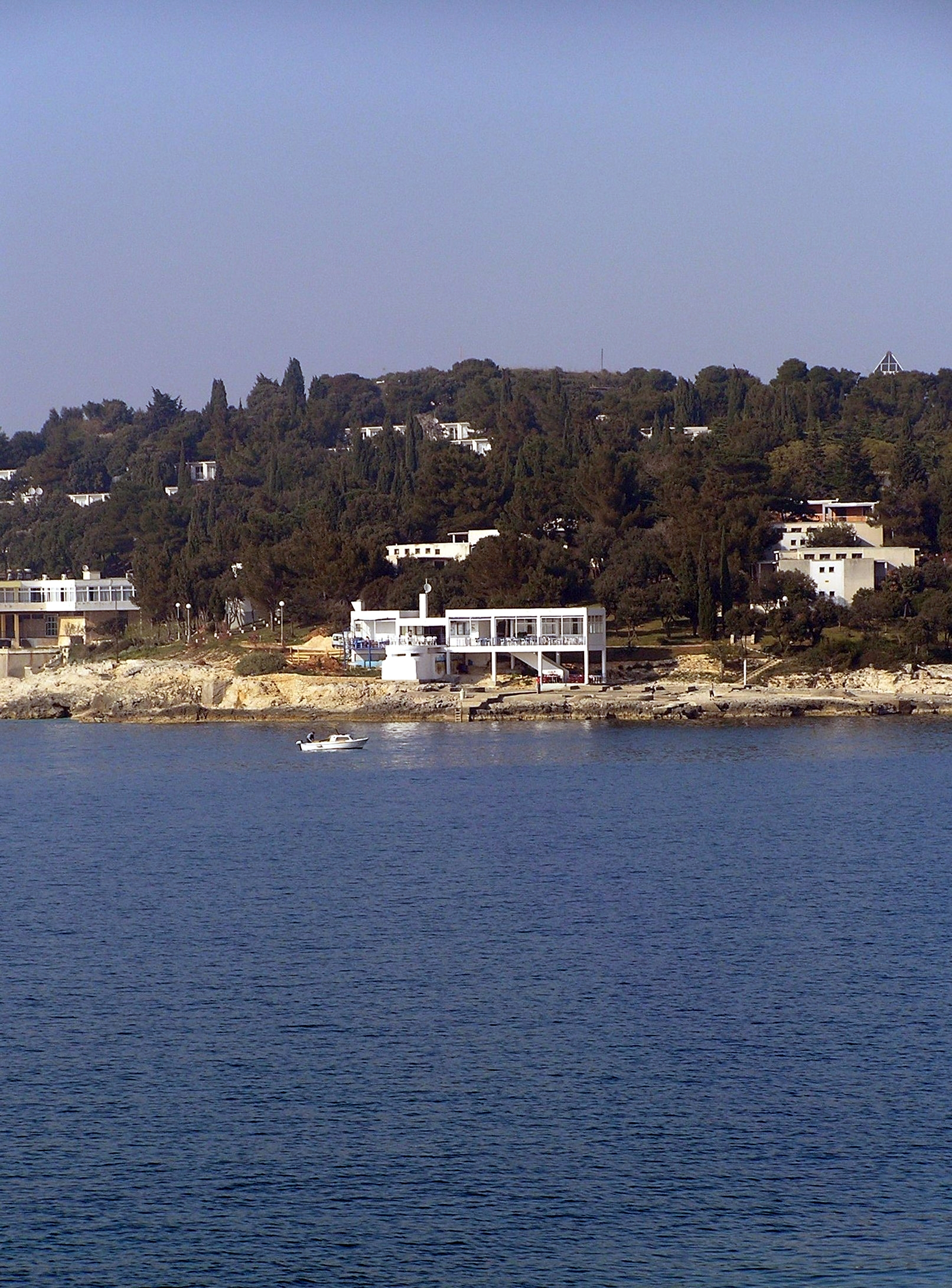 A coast near Pula, Croatia self-made